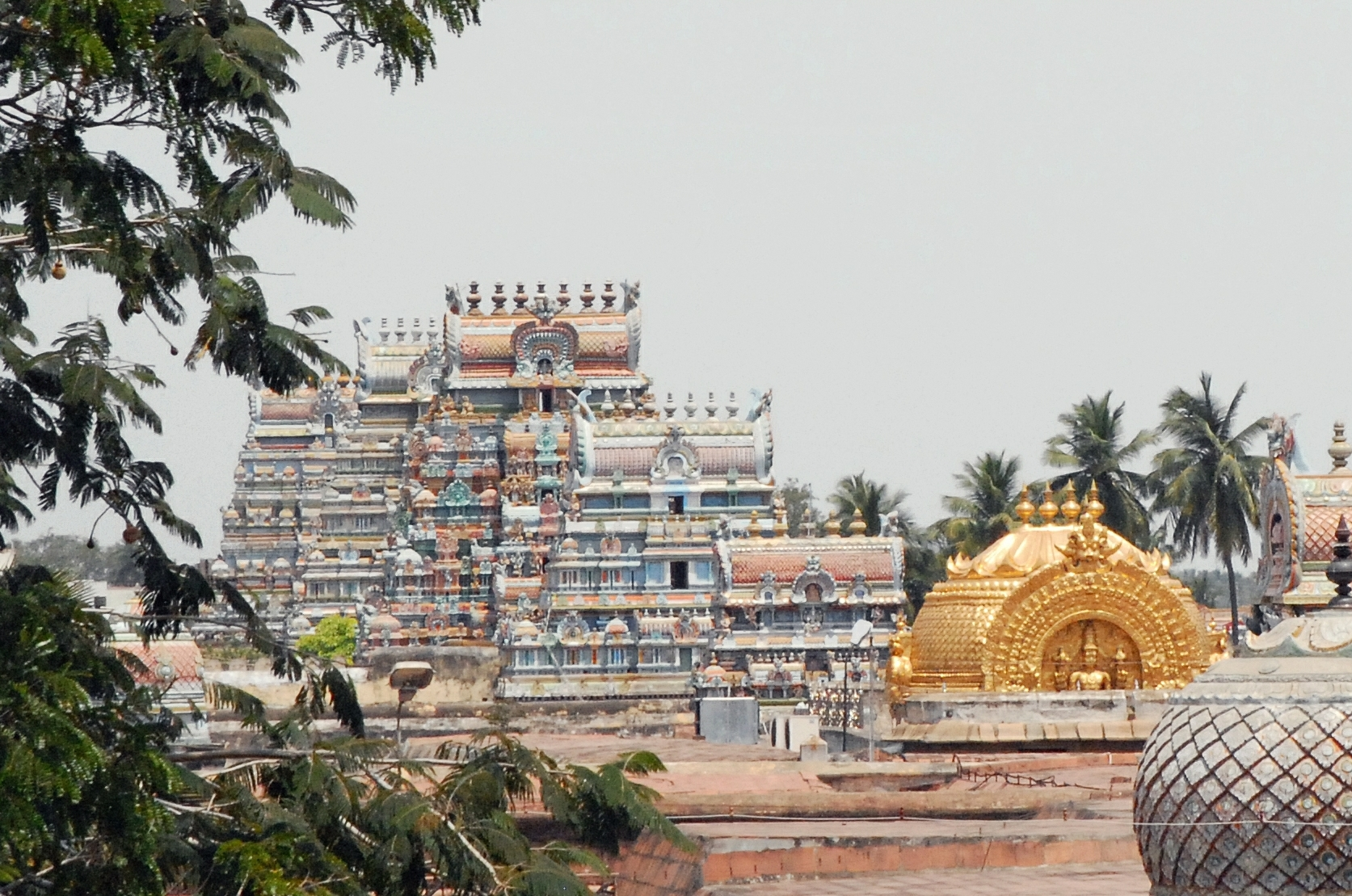 Le sanctuaire d'or (Vimana) et les portes nord (gopuram) du temple de Srirangam (Ranganath Swami) à Tiruchirapalli (Trichy) Le temple de Srirangam est une véritable cité religieuse, dont l'édification a commencé au Xème siècle. Le sanctuaire dédié à Vishnu (golden temple) est au centre des bâtiments, c'est la partie la plus ancienne. Srirangam est le premier des cent huit sanctuaires du dieu Vishnu (appelé ici : Ranganatha, qui est la forme de repos de Vishnou). C'est le plus vaste temple avec 156 hectares et le plus célèbre. Le temple est constitué de sept enceintes dominées par 21 gopuram(s) (portes d'entrée monumentales). Il comprend de nombreuses boutiques, bassins, mandapa(s) et petits temples. La partie centrale (au-delà de la 6ème enceinte) et le sanctuaire sont réservés aux hindous. Article de Wikipedia sur le temple de Srirangam Le site officiel du temple